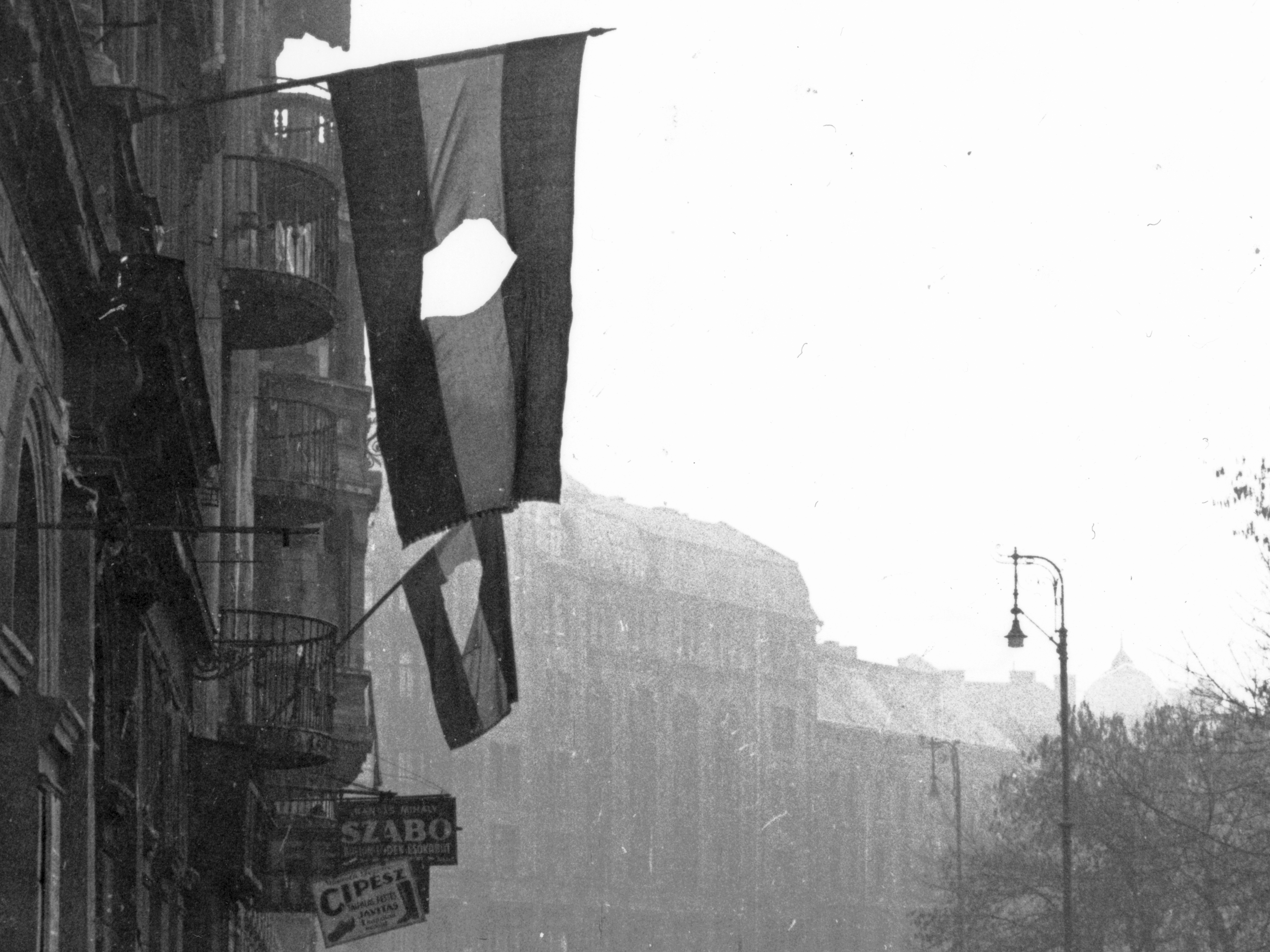 II. János Pál pápa (Köztársaság) tér a Vay Ádám utca felől a Népszínház utca felé nézve.